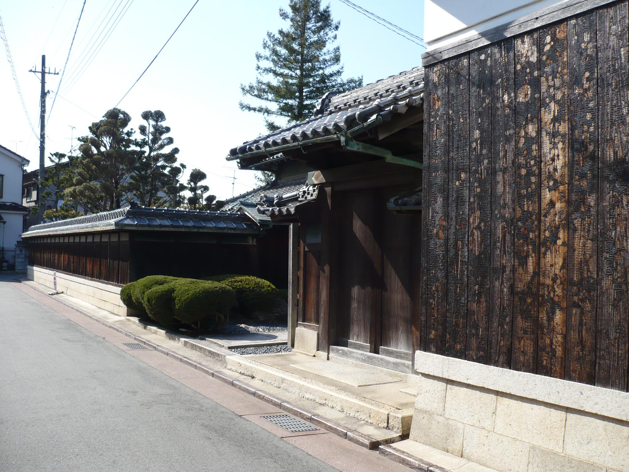 山下城の居城推定地